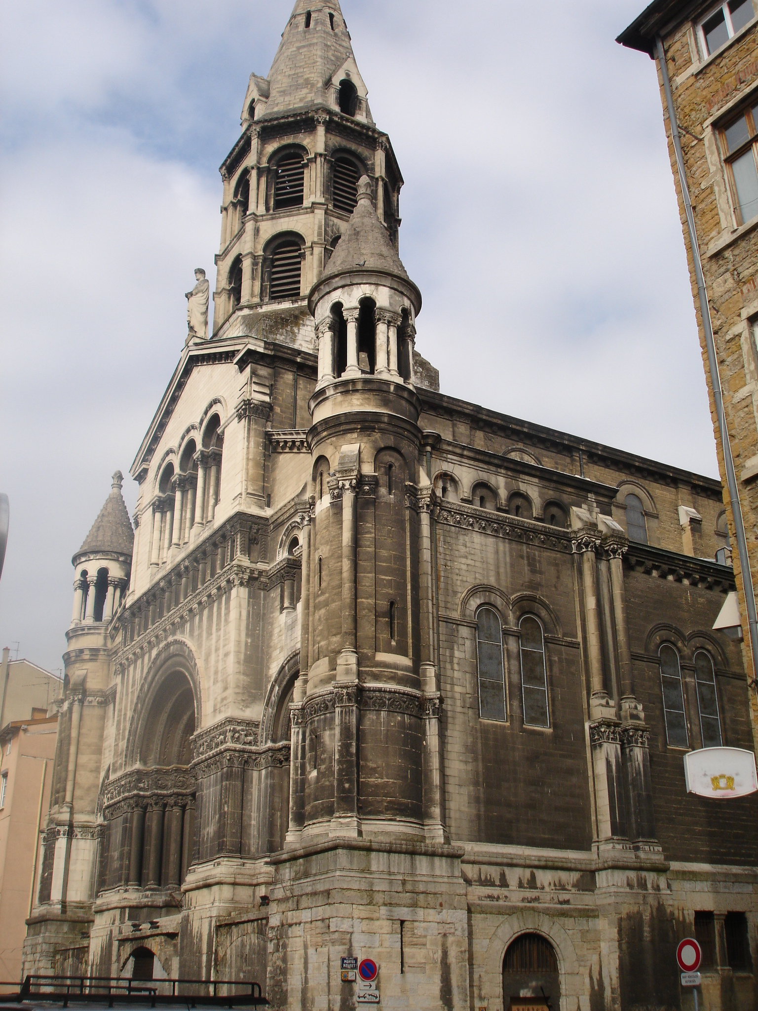 Lyon Les Pentes : église du bon pasteur